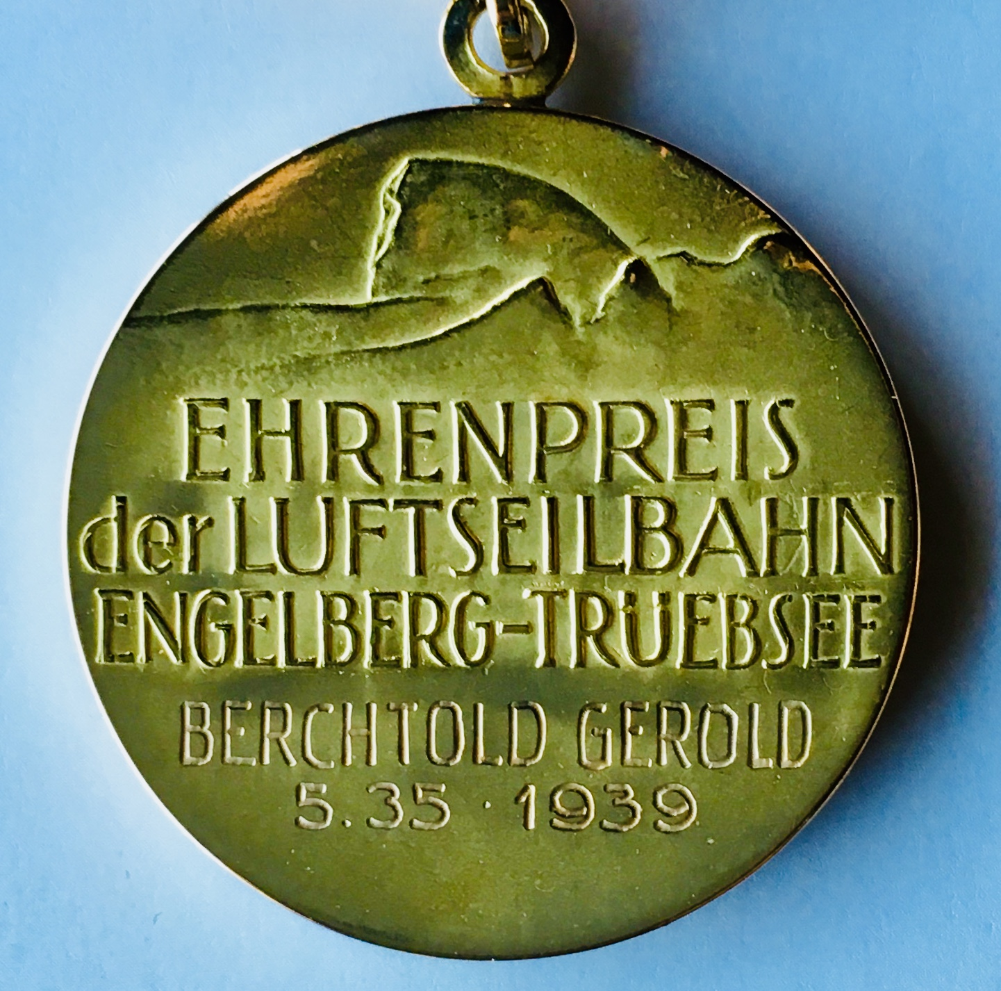 1. Goldmedaille gewonnen durch Gerold Berchtold, vom 4. Titlis Riesenslalom 1939, Engelberg